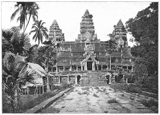 "De drie torens van den tempel van Angkor-Wat"